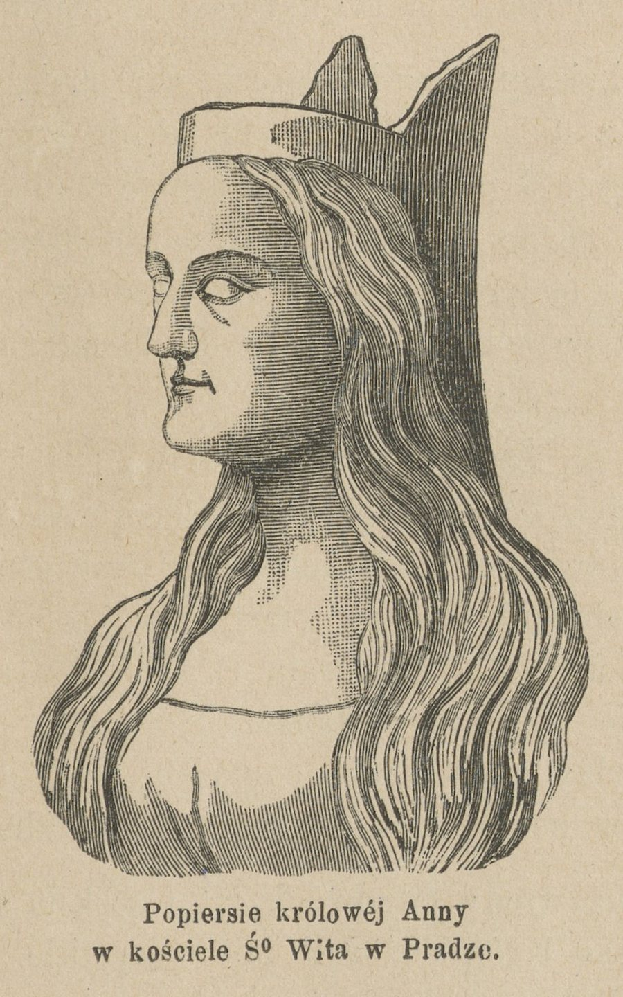 Popiersie Anny Świdnickiej w Katedrze Wita w Pradze.